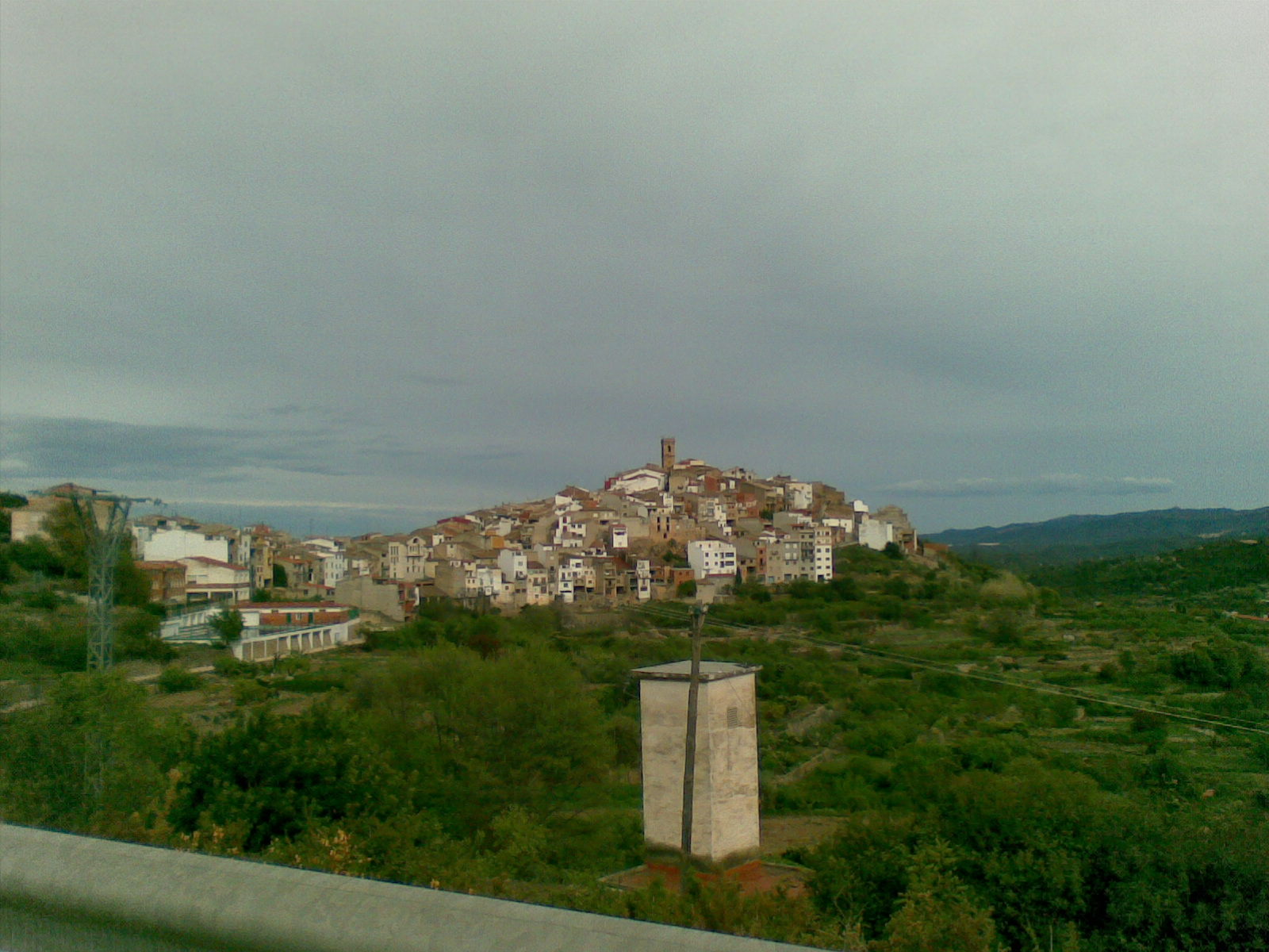 Vista de Useras (Castellón, Comunidad Valenciana)